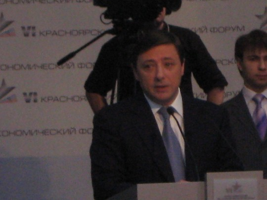 Хлопонин, Александр Геннадиевич на Красноярском экономическом форуме 2009